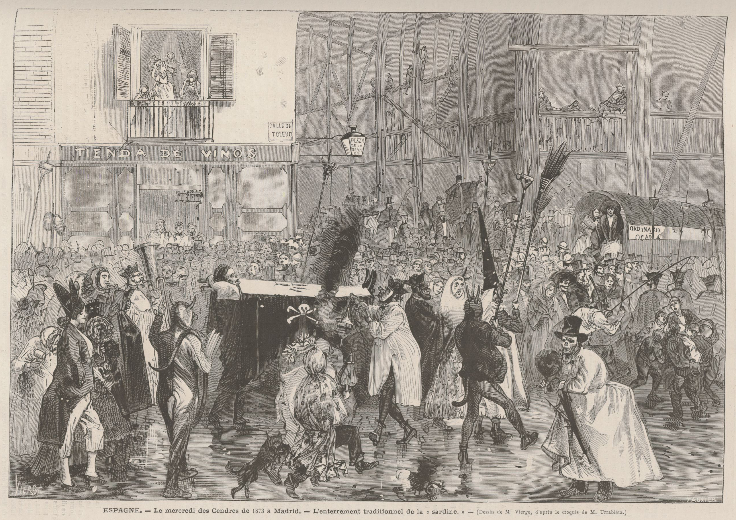 Espagne, le mercredi des Cendres de 1873 à Madrid, l'enterrement traditionnel de la sardine (dessin de M. Vierge, d'après le croquis de M. Urrabieta).